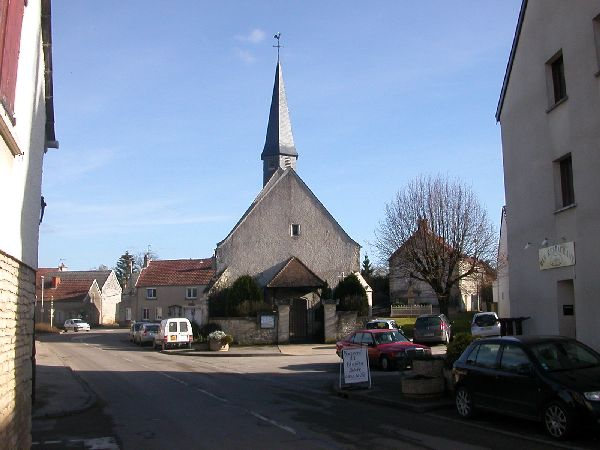 ÉGLISE SAINT SÉBASTIEN DE BELLEFOND (Côte d'or) En 1533 le Cardinal Duprat, légat de France, accorde aux « manants » de Bellefond, l’autorisation d’ériger une église. Celle-ci devrait faire à l’origine 12m x 8m, c'est-à-dire la dimension du chœur actuel. En 1541, l’église de Bellefond est consacrée à Saint Sébastien. On ne connaît pas les dates des différentes phases modificatives de l’architecture initiale : destruction de la voûte du chœur, création d’un clocheton sur le chœur, création de la nef actuelle. En 1750, Saint-Sébastien est érigée en cure. En 1854, un projet de restauration avec extension de l’édifice en partie ouest, avec un clocher de 17m de haut est envisagé. Le clocher pointu est de réalisation récente.